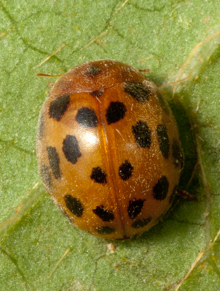 Marusiña (Subcoccinella vigintiquatuorpunctata) en Bastavales, Brión, Galiza